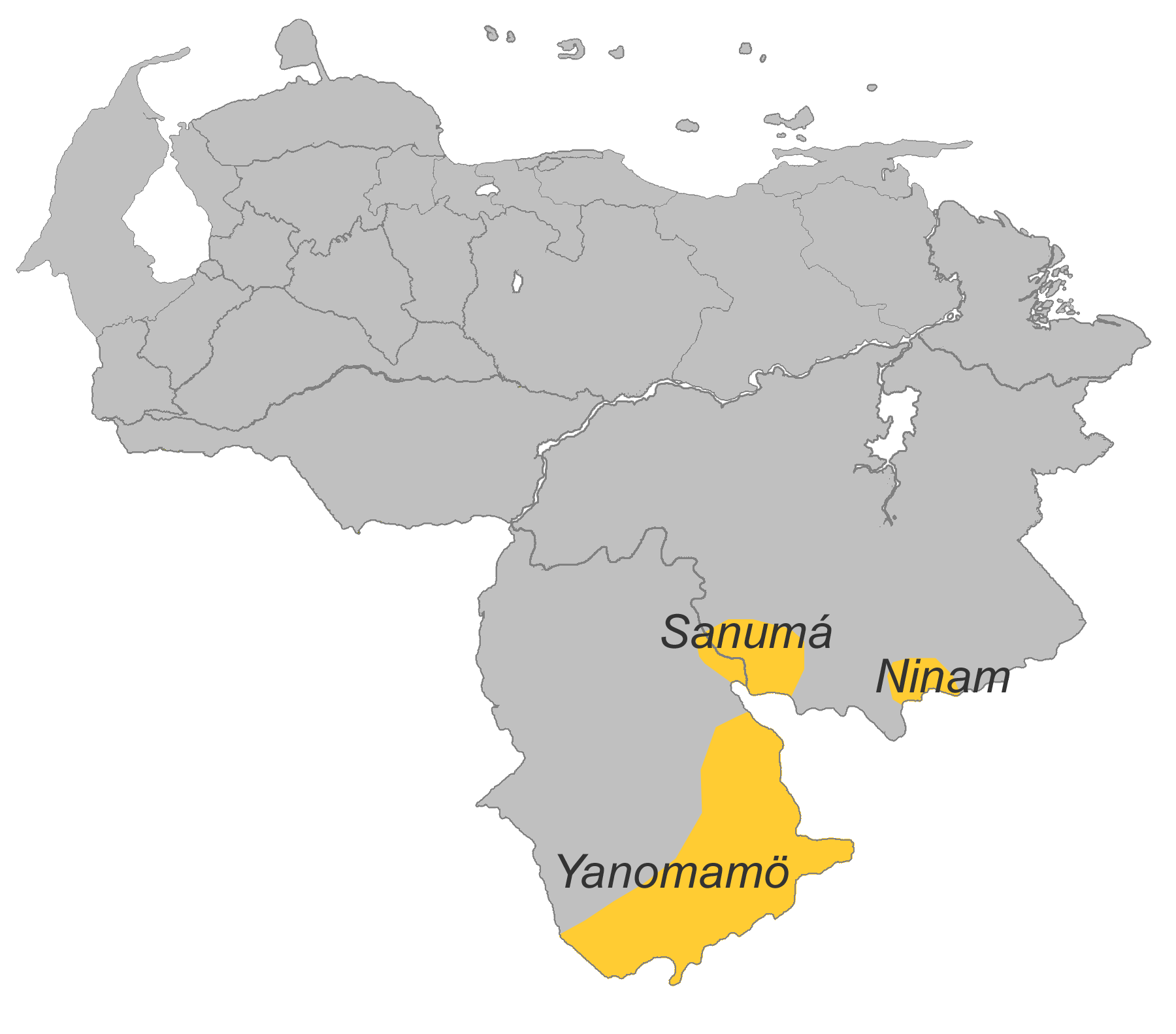 Yanomami Languages in Venezuela